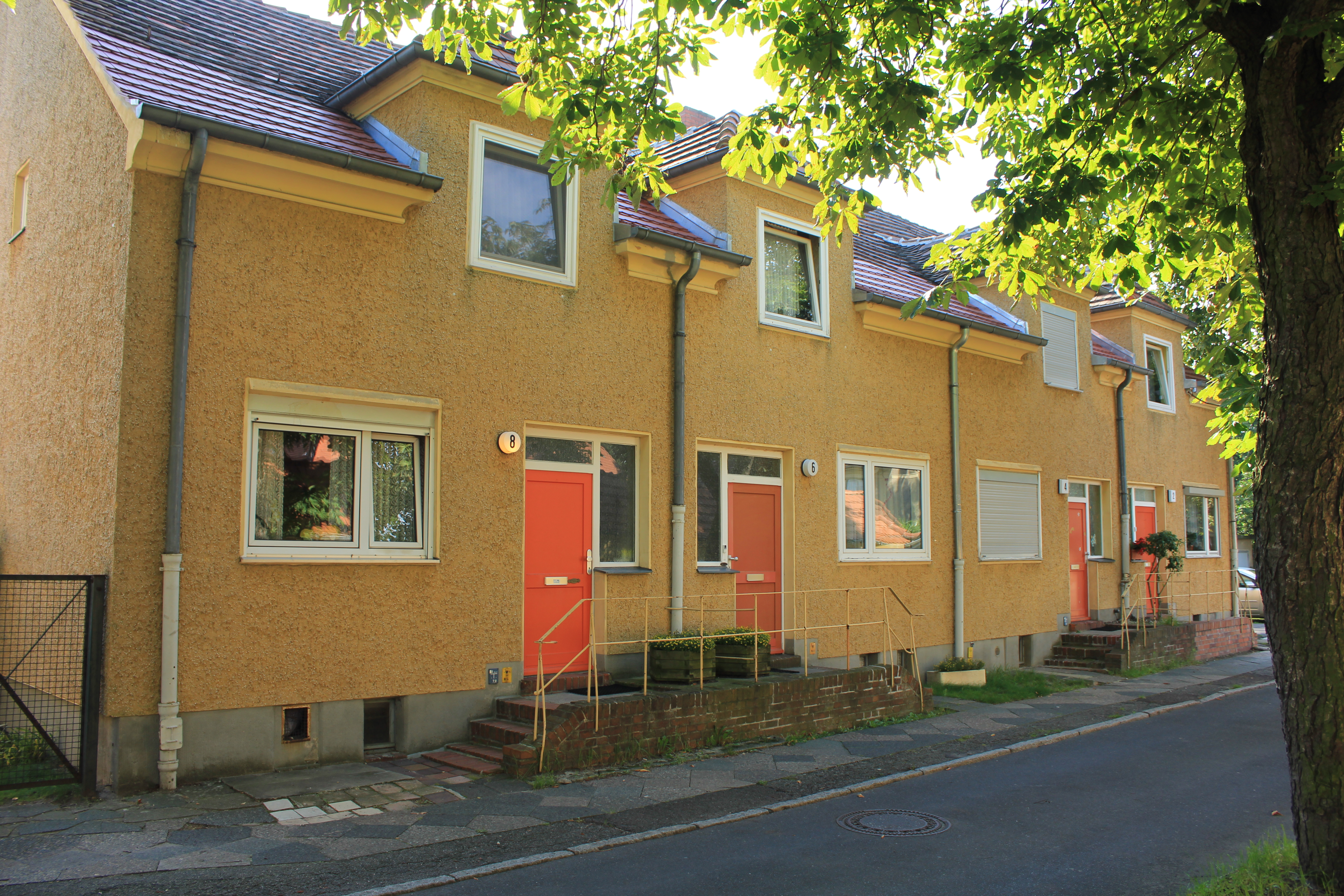 Berlin,Gartenstadt Staaken, Siedlung